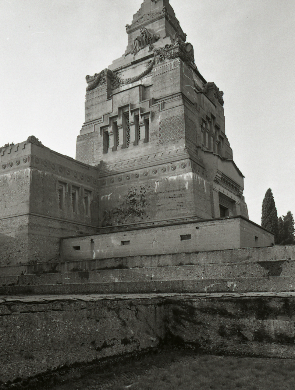 Capriate San Gervasio. Villaggio operaio di Crespi d'Adda: particolare della villa padronale dei signori Crespi; vedute eparticolari del cimitero con il famedio della famiglia Crespi e le piccole lapidi a forma di croce. Servizio fotografico : Capriate San Gervasio, 1979 / Paolo Monti. - Strisce: 7, Fotogrammi complessivi: 36 : Negativo b/n, gelatina bromuro d'argento/ pellicola ; 35 mm. - ((Sul portanegativi: N[I]K[MA]T FP4 e iscrizione tipografica commerciale: "KINO - CINE - FOTO - OTTICA/ Corso Sempione 3/ 20145 Milano/ Telefoni/ 347769 - 381662 [cancellato a pennarello nero]; stampa tipografica a inchiostro rosso "K". Iscrizione documentaria manoscritta a penna nera: "2° viaggio". - Occasione: Pubblicazione (Einaudi, 1981) [2° viaggio]. - Fonte: Agenda di Paolo Monti: Nikon Leika 3001-/ Monti 1978 (1978-1982), presso Archivio Paolo Monti. - Fonte: Monografia: Villaggi operai in Italia: la Val Padana e Crespi d'Adda, Torino, Einaudi (1981). - Fonte: Fattura di Paolo Monti: IV. Commesse/ Fattura n. 09/ Riprese fotografiche per volume Villaggi operai (1981/03/10), presso Archivio Paolo Monti. N. 39 fotografie formato 24x30 scelte da oltre 100 eseguite a Crespi d'Adda in due viaggi successivi. N. 15 fotografie come sopra per il Professor Amerigo Restucci di Venezia